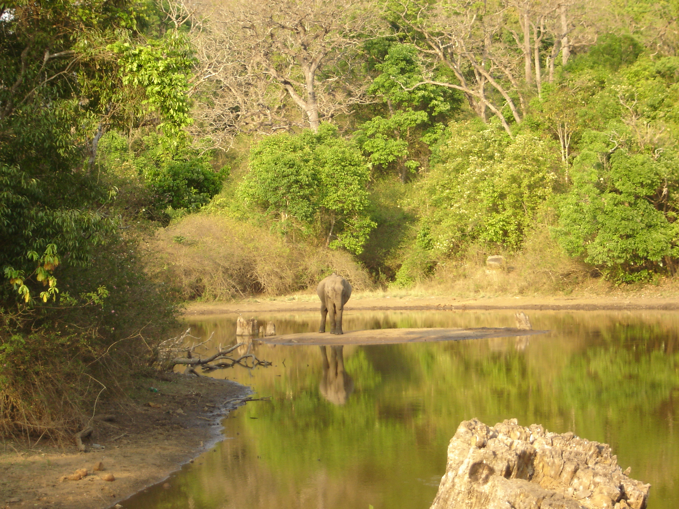 யானை - தமிழ்நாடு கருநாடகா வனப்பகுதியில்